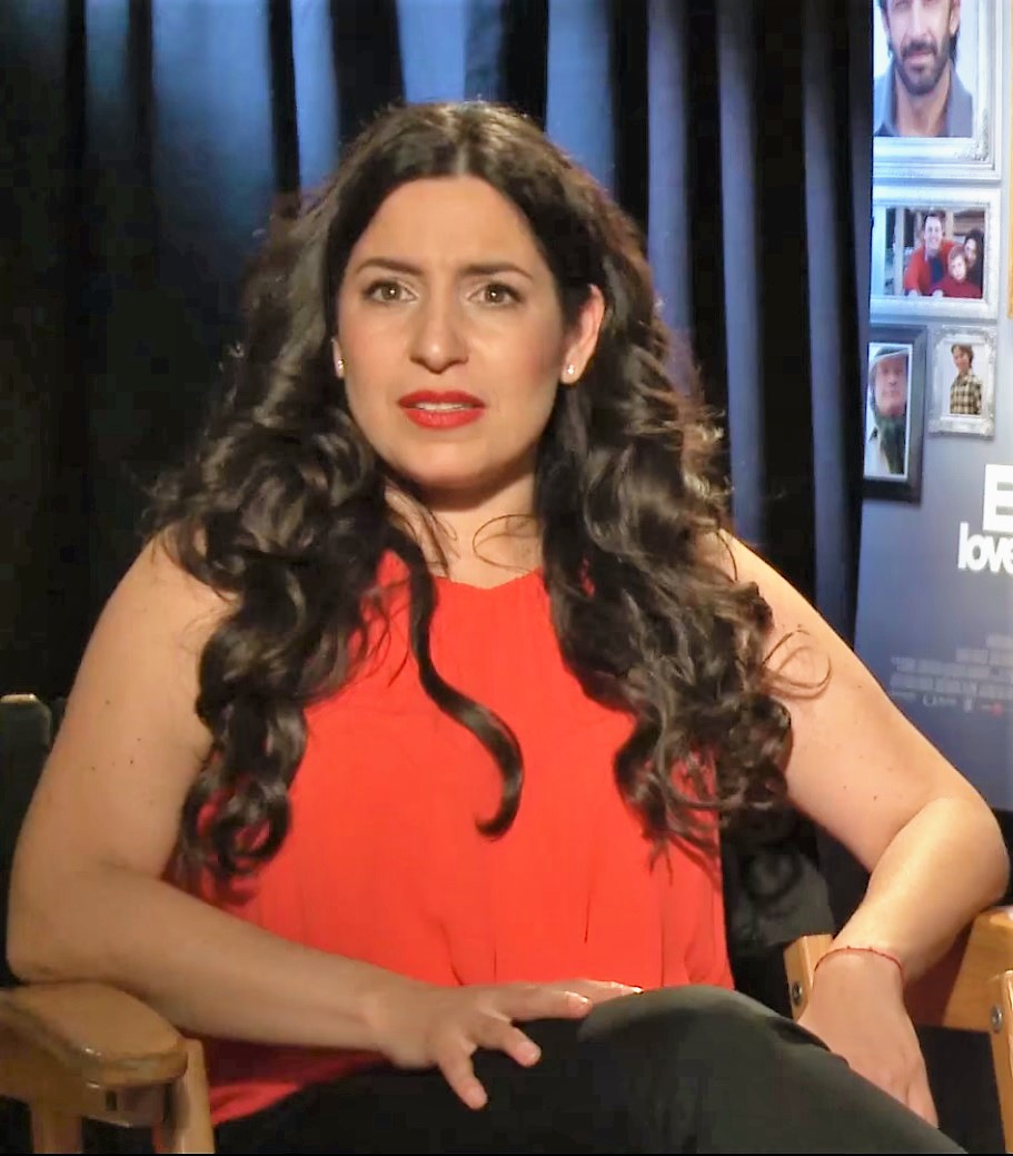 Tiaré Scanda y Patricia Bernal se someten al reto de canto y de contestar juego de 'la pura neta' by Dulce Osuna